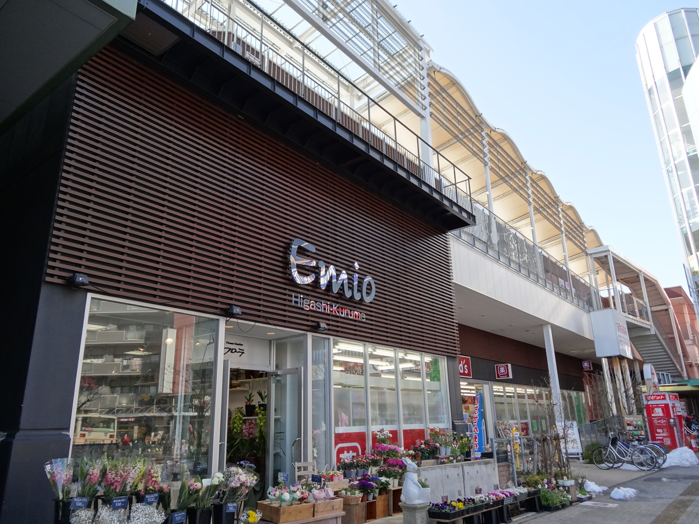 Emio-Higashi-kurume 2014/02/17